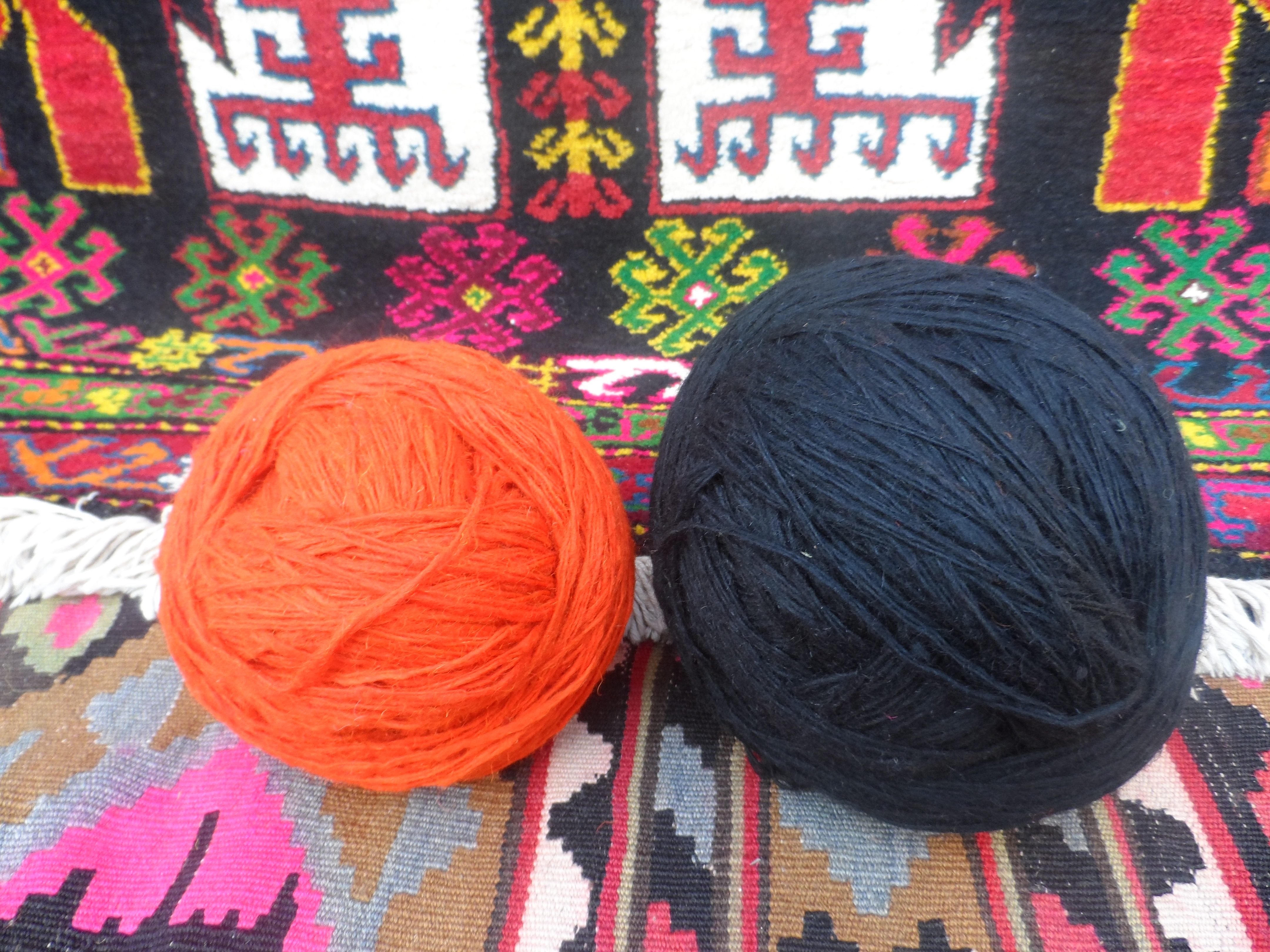 Yun yumağı